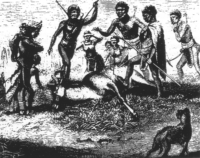 Hottentotten - Weiber kommen aus dem Wasser zurück, und Männer rings um eine tote Kuhantilope, David Livingston, "Missionary Travels in South Africa" 1857